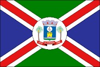 Bandeira de Alcobaça, Bahia, Brasil.